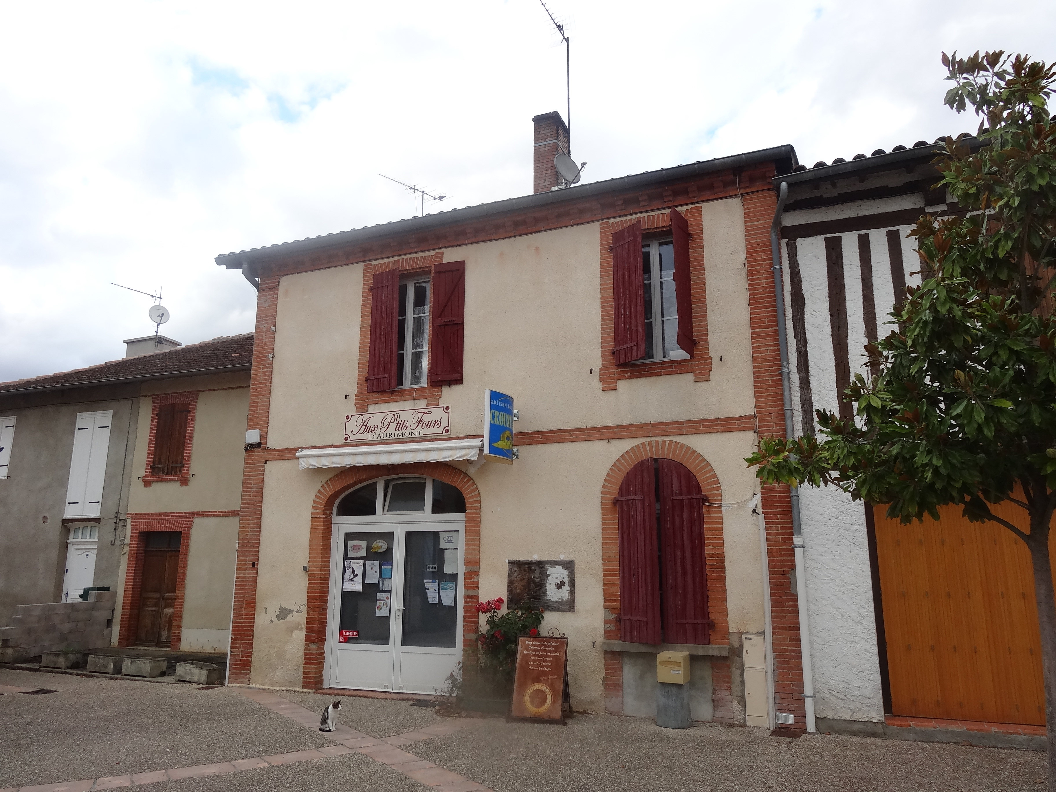 Boulangerie à Aurimont.